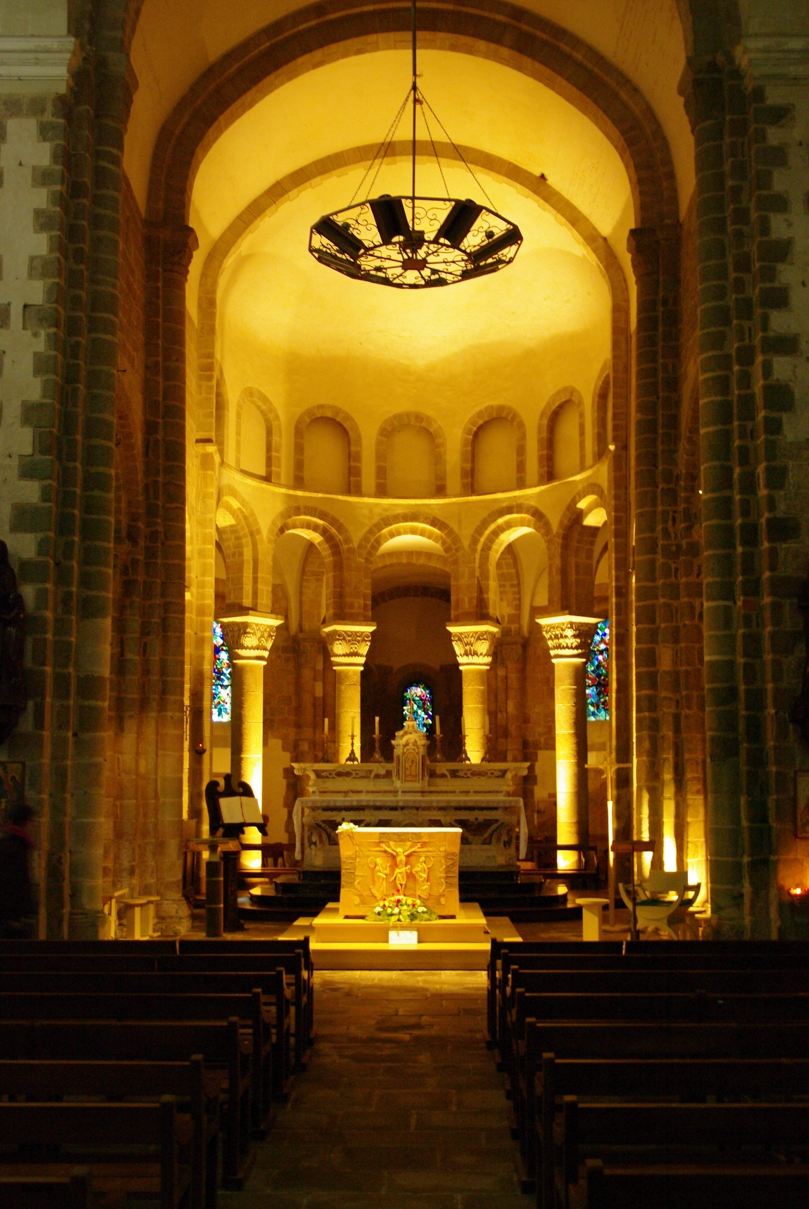 Le choeur de l'abbatiale de Saint Gildas de Rhuys, Morbihan.